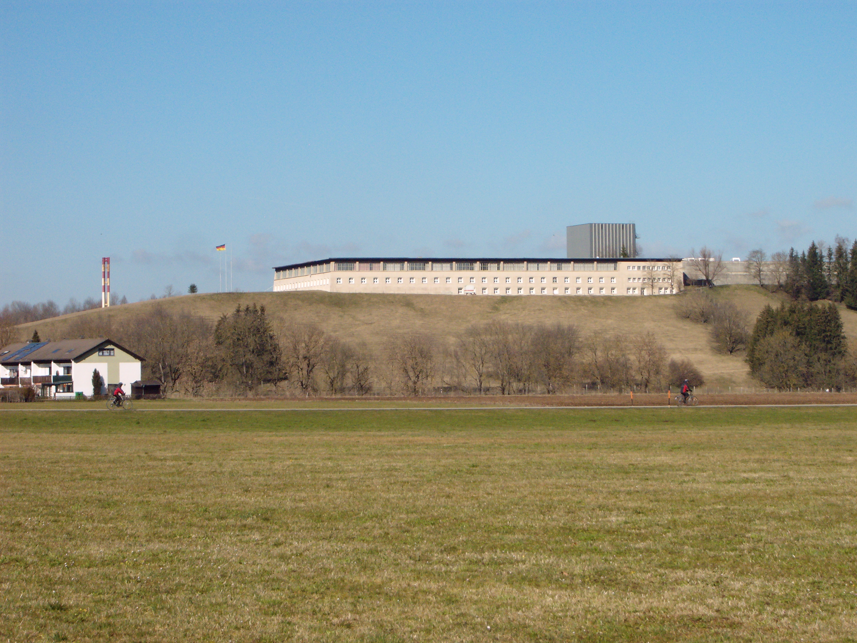 Franz-Josef-Strauss-Kaserne / Luftlandeschule in Altenstadt, Landkreis Weilheim-Schongau